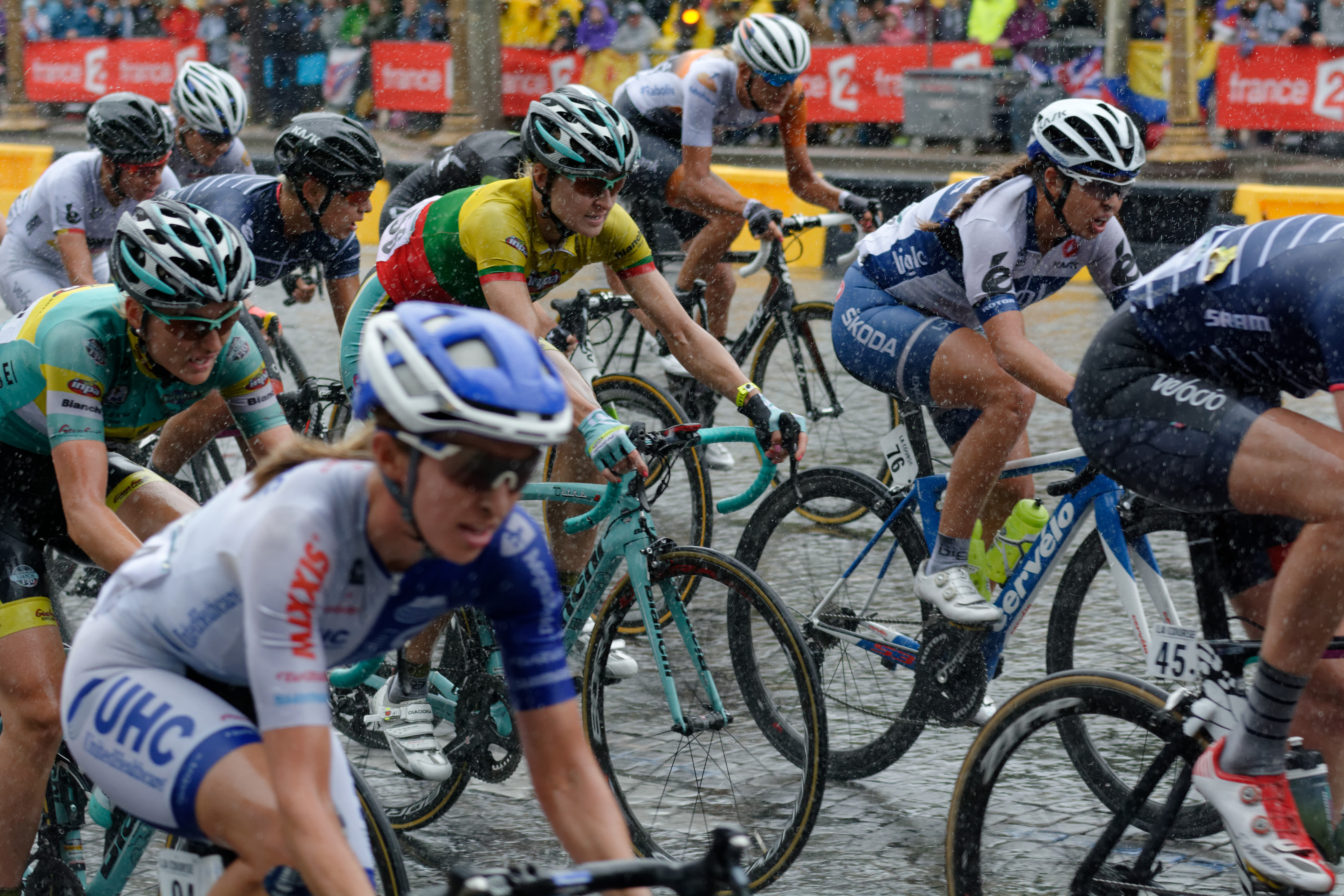 D71_2269_DxO